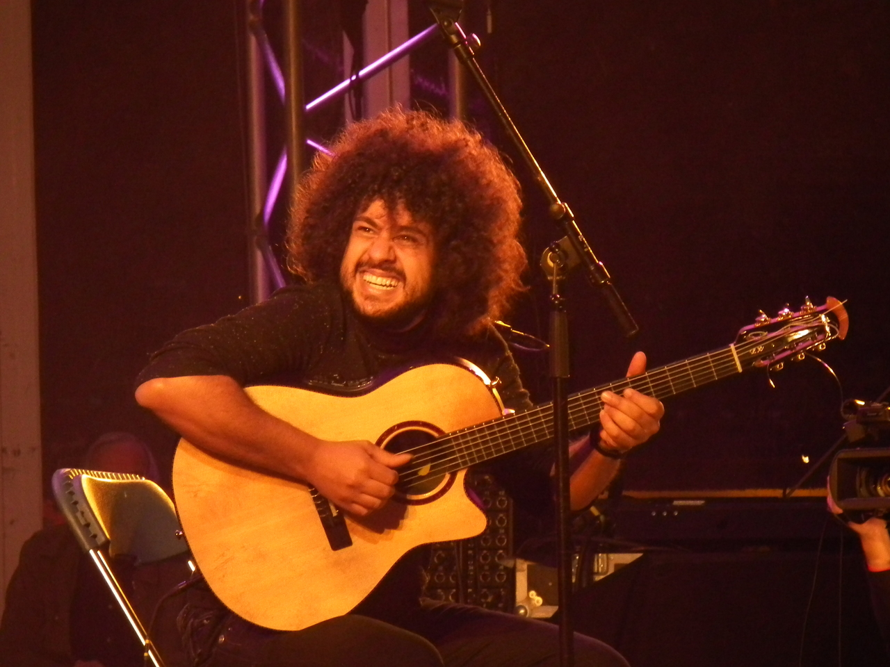 Diego Figueiredo no Haarlem Jazz Stad em 2010